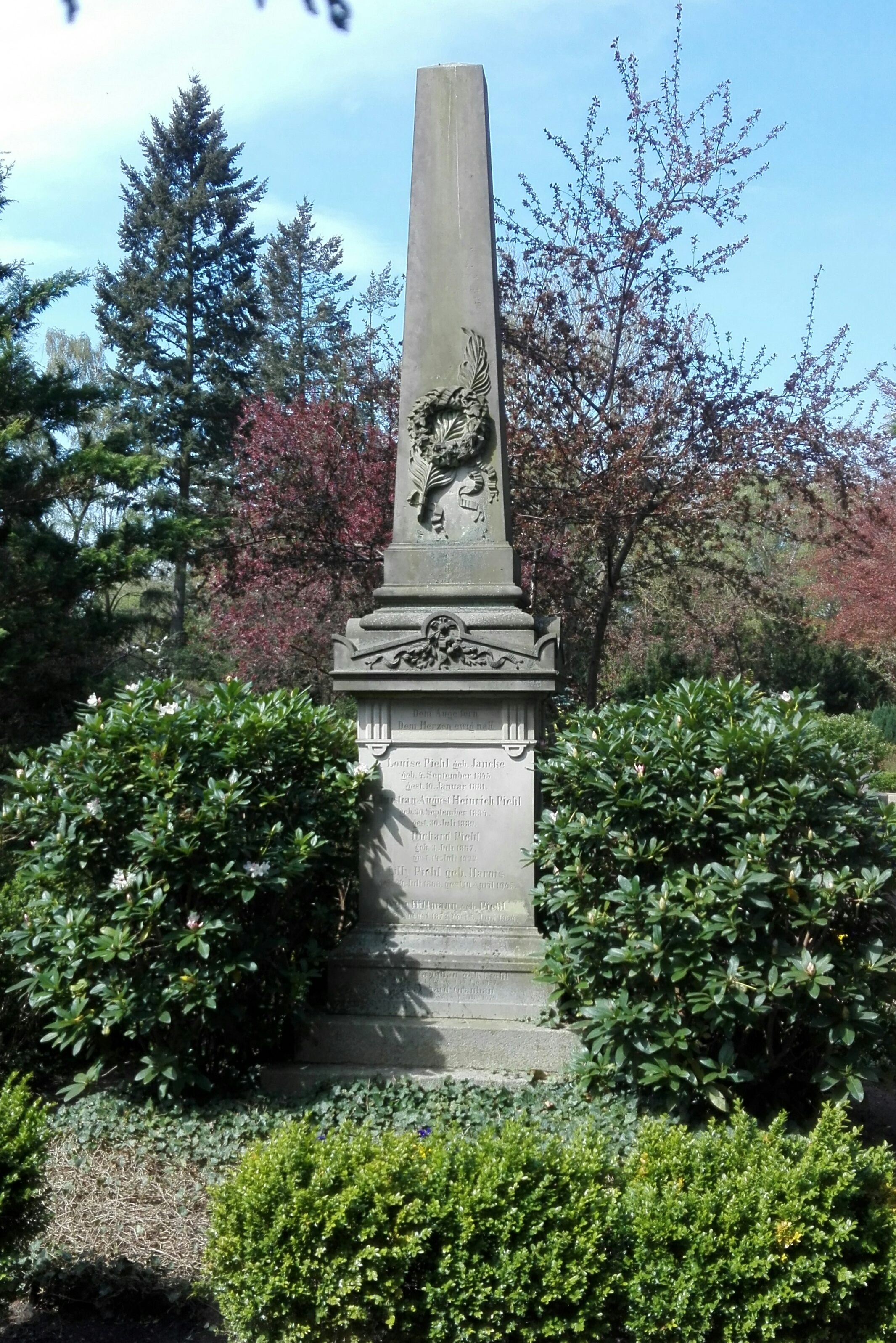 Familiengrab der Familie Piehl auf dem Burgtorfriedhof